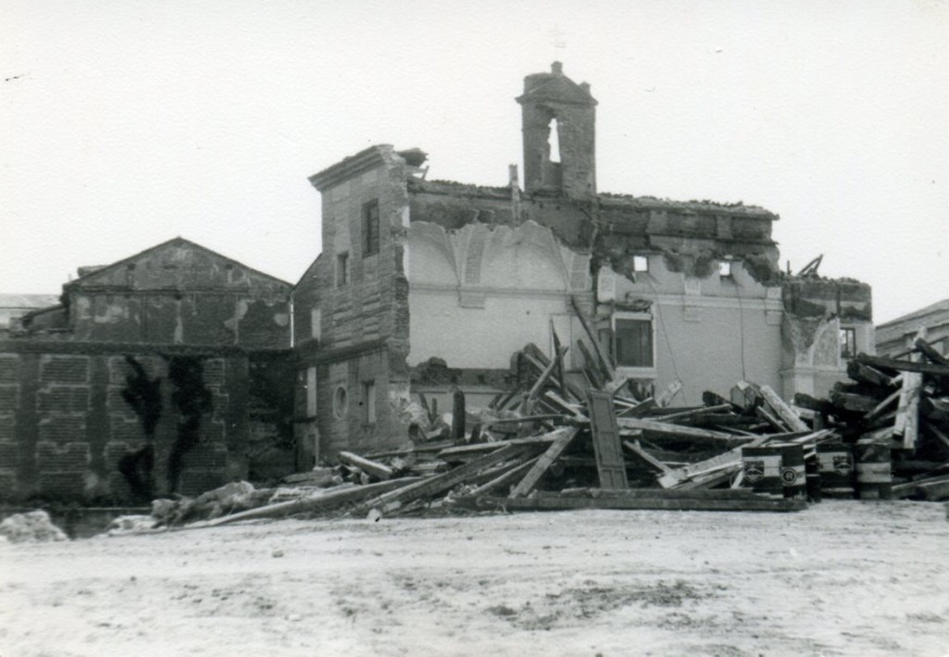 Demolicion Casas Reales de Arevalo